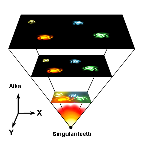 Entstehung des Universums beim Urknall